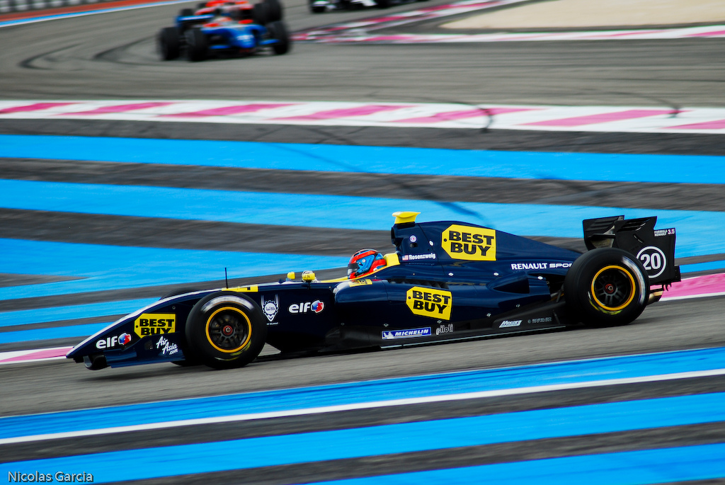 20 Jake Rosenzweig - Mofaz Racing - 2011 Formula Renault 3.5 Series - Circuit Paul Ricard - Race 2